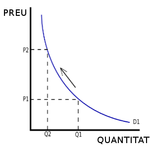 Corba de Demanda